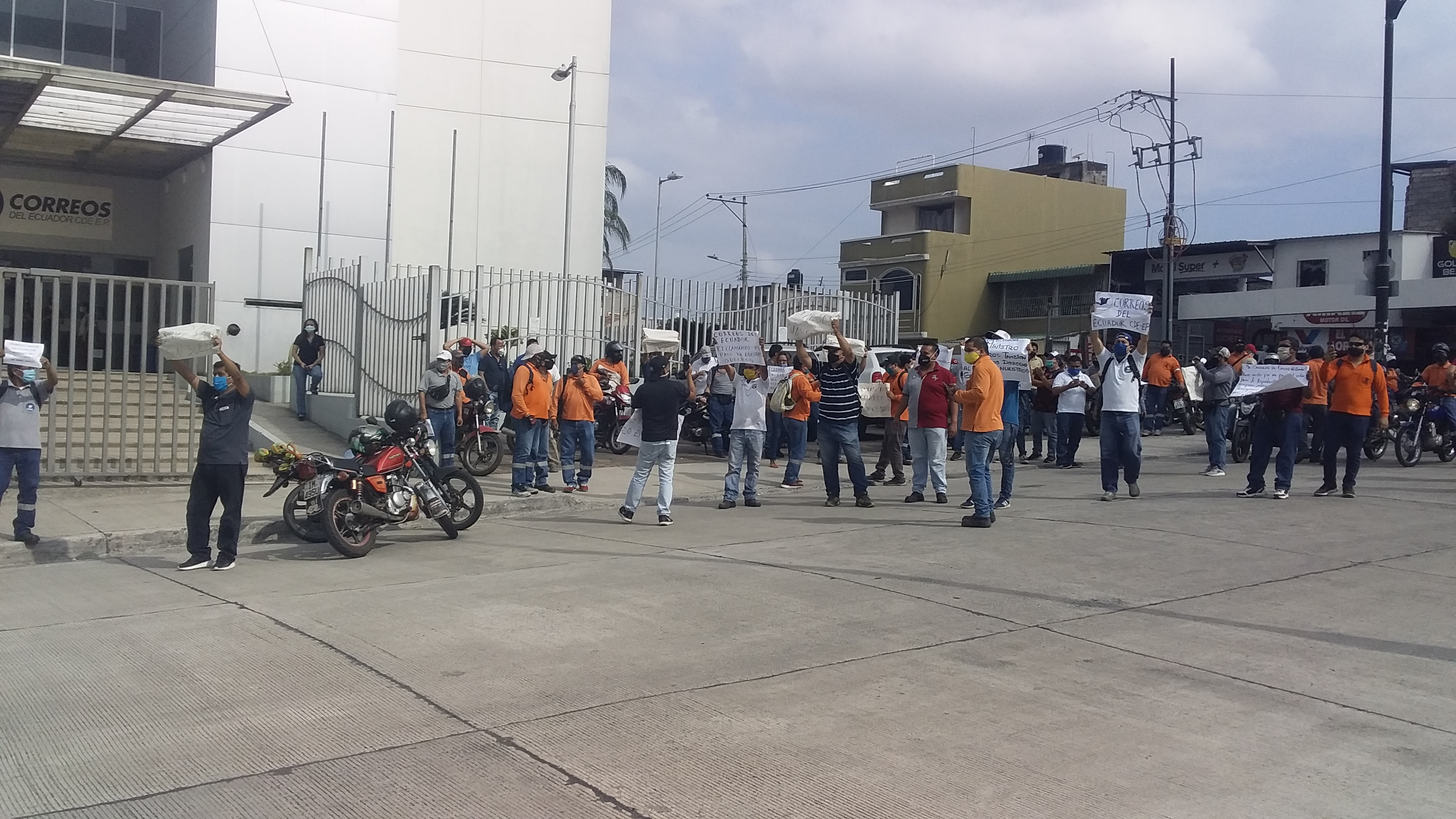 protestas de trabajadores de la empresa Correos del Ecuador